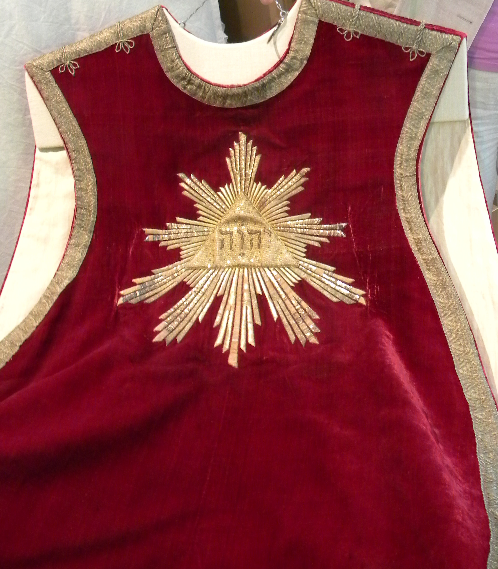 Mässhake från 1787 med tetragrammet JHWH i Kungälvs kyrka